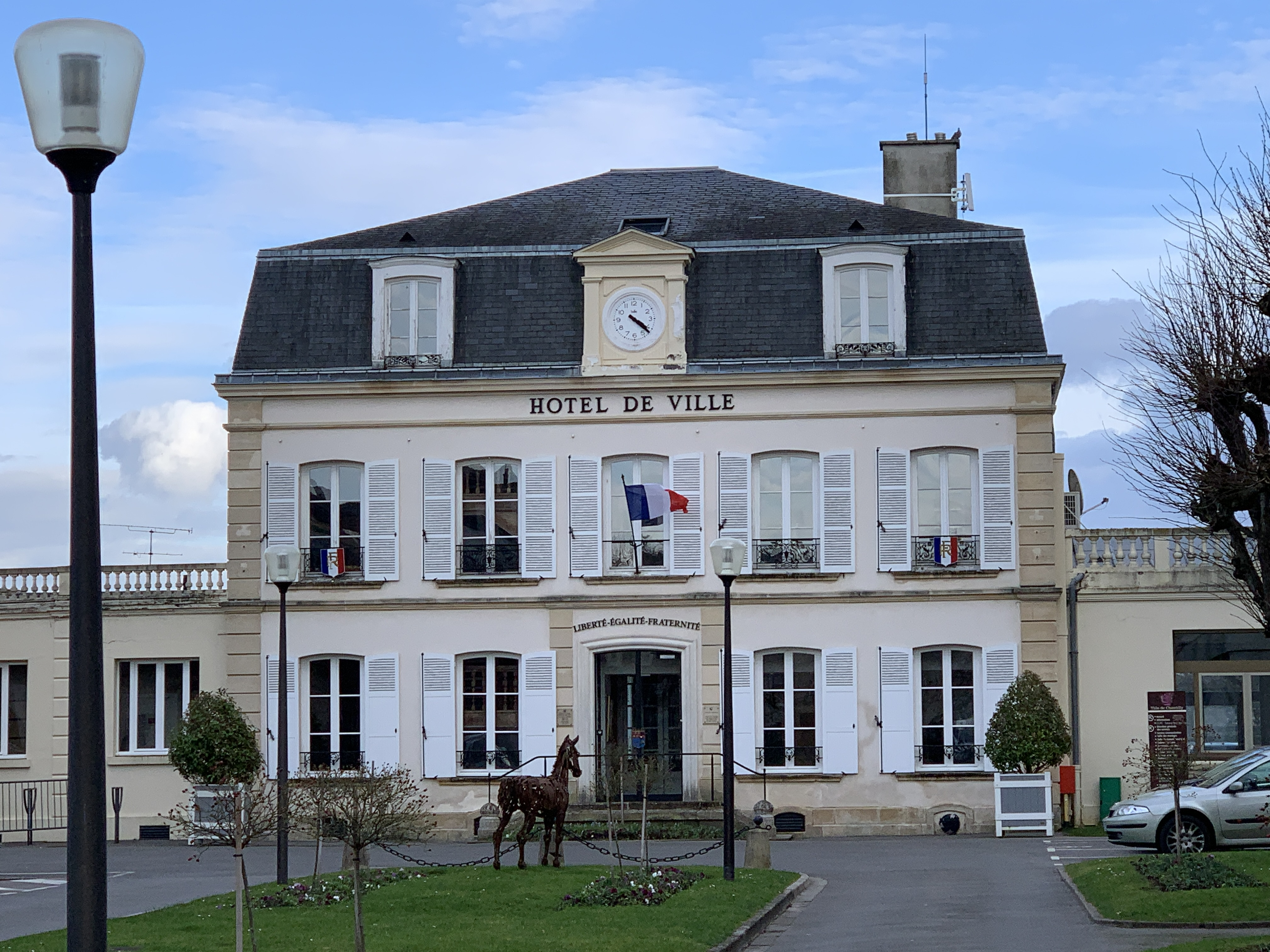 Hôtel de ville de Chantilly.